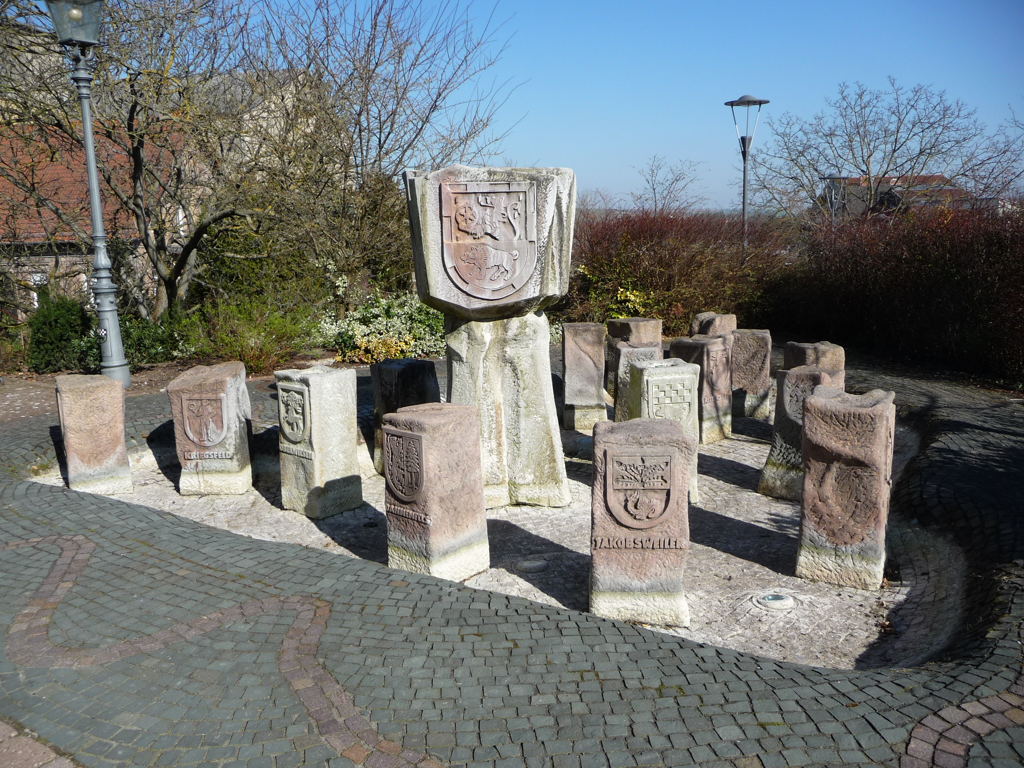 Rathaus in Kirchheimbolanden, Rheinland-Pfalz